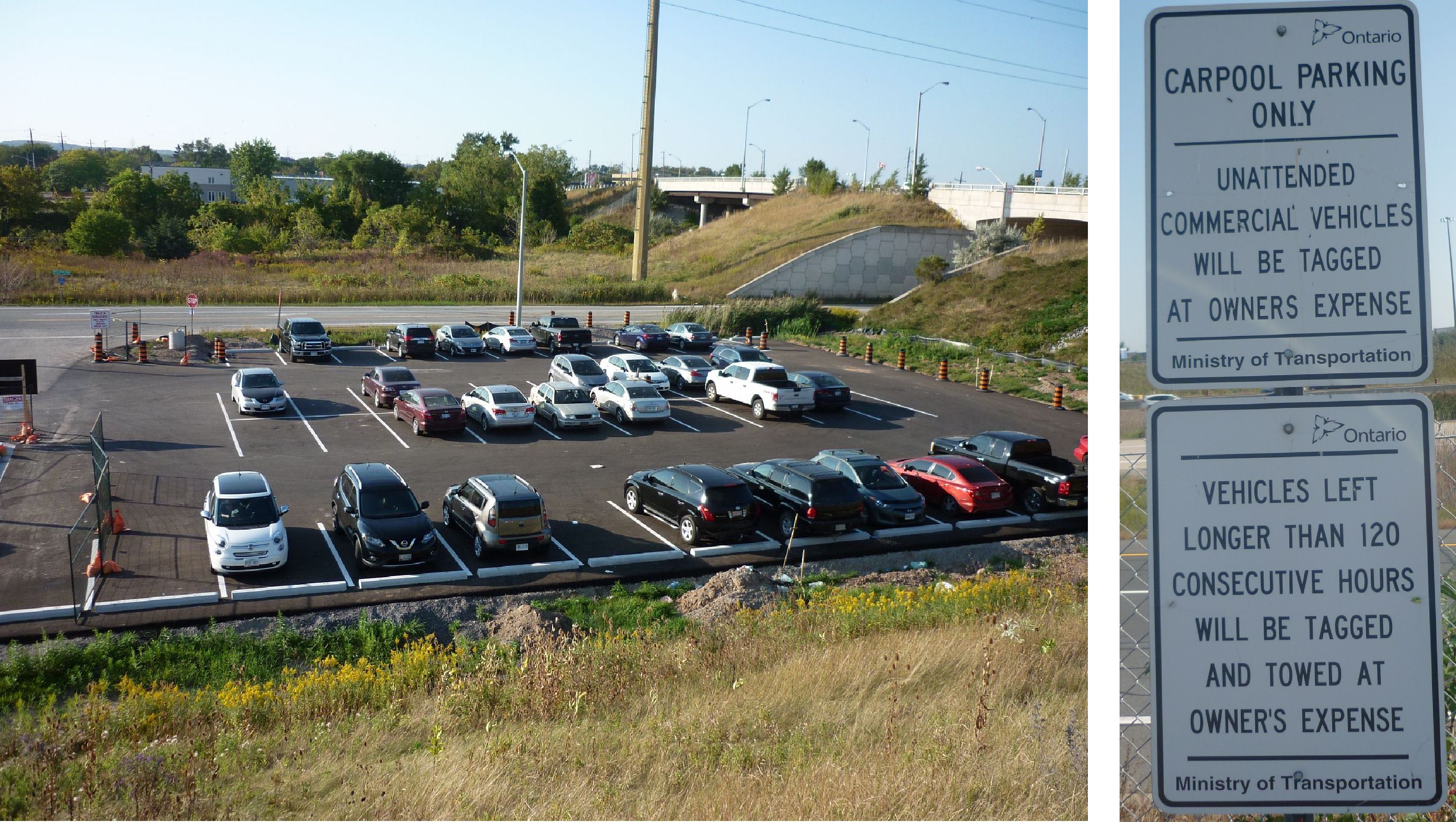 Carpool lot at QEW&Guelph Line, city of Burlington, Ontario